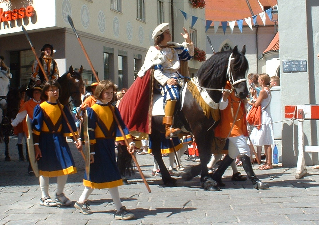 Tänzelfest Kaiser Maximilian